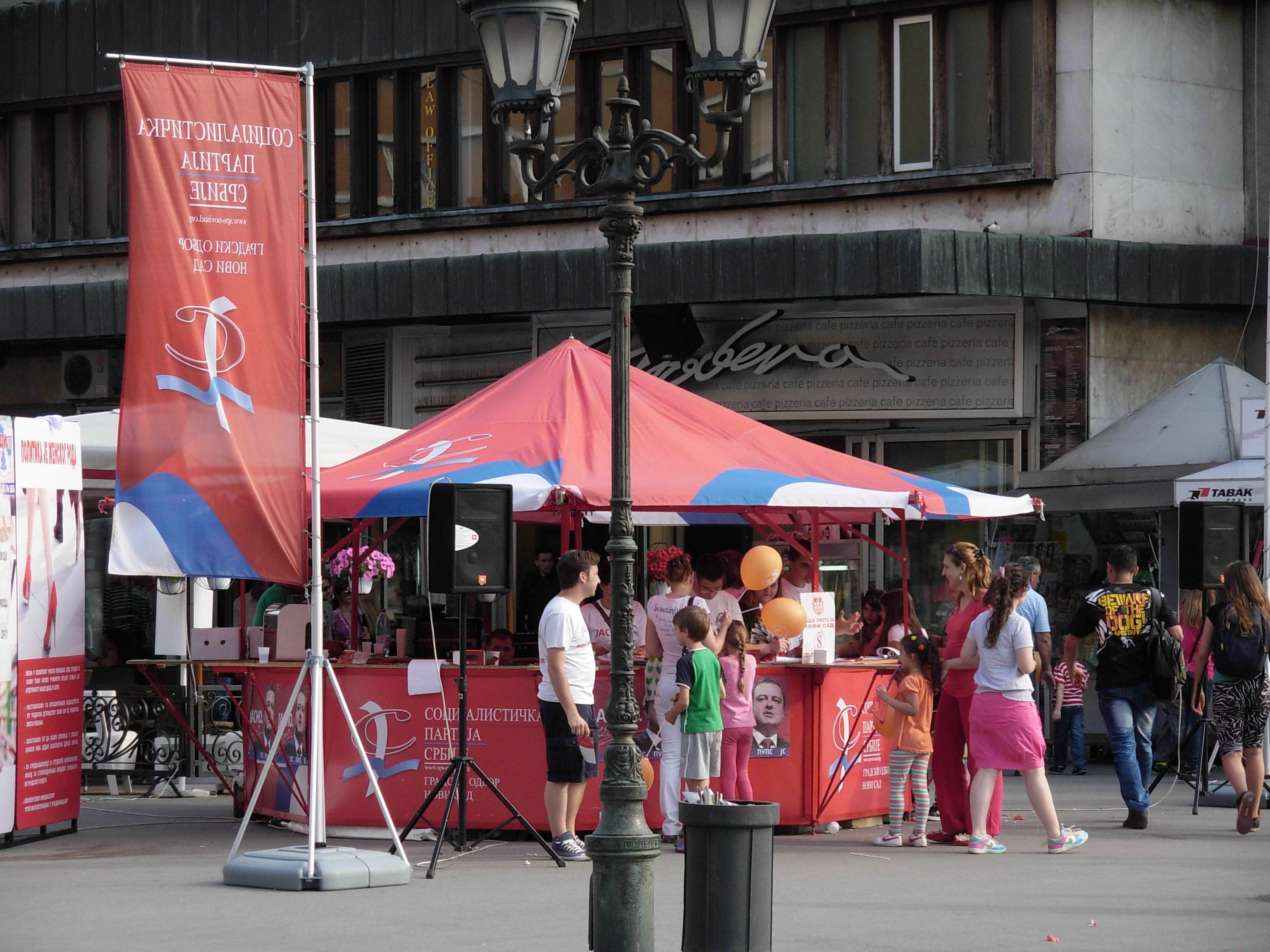 Štand Socijalističke partije Srbije u Novom Sadu.